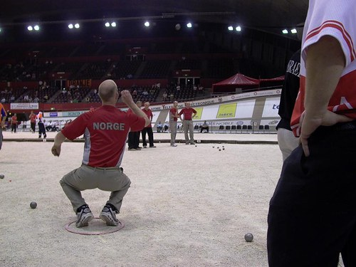 Pétanque